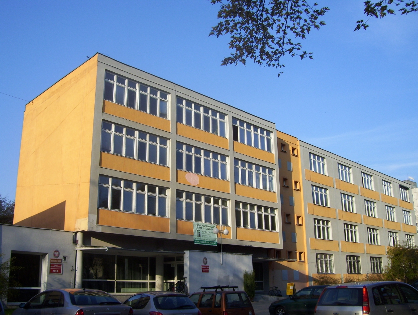 Instytut Filozofii Uniwersytetu Łódzkiego, ul. Kopcińskiego.